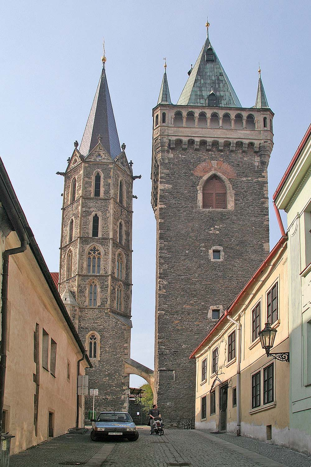 Kolín, chrám sv. Bartoloměje, Karlova ulice